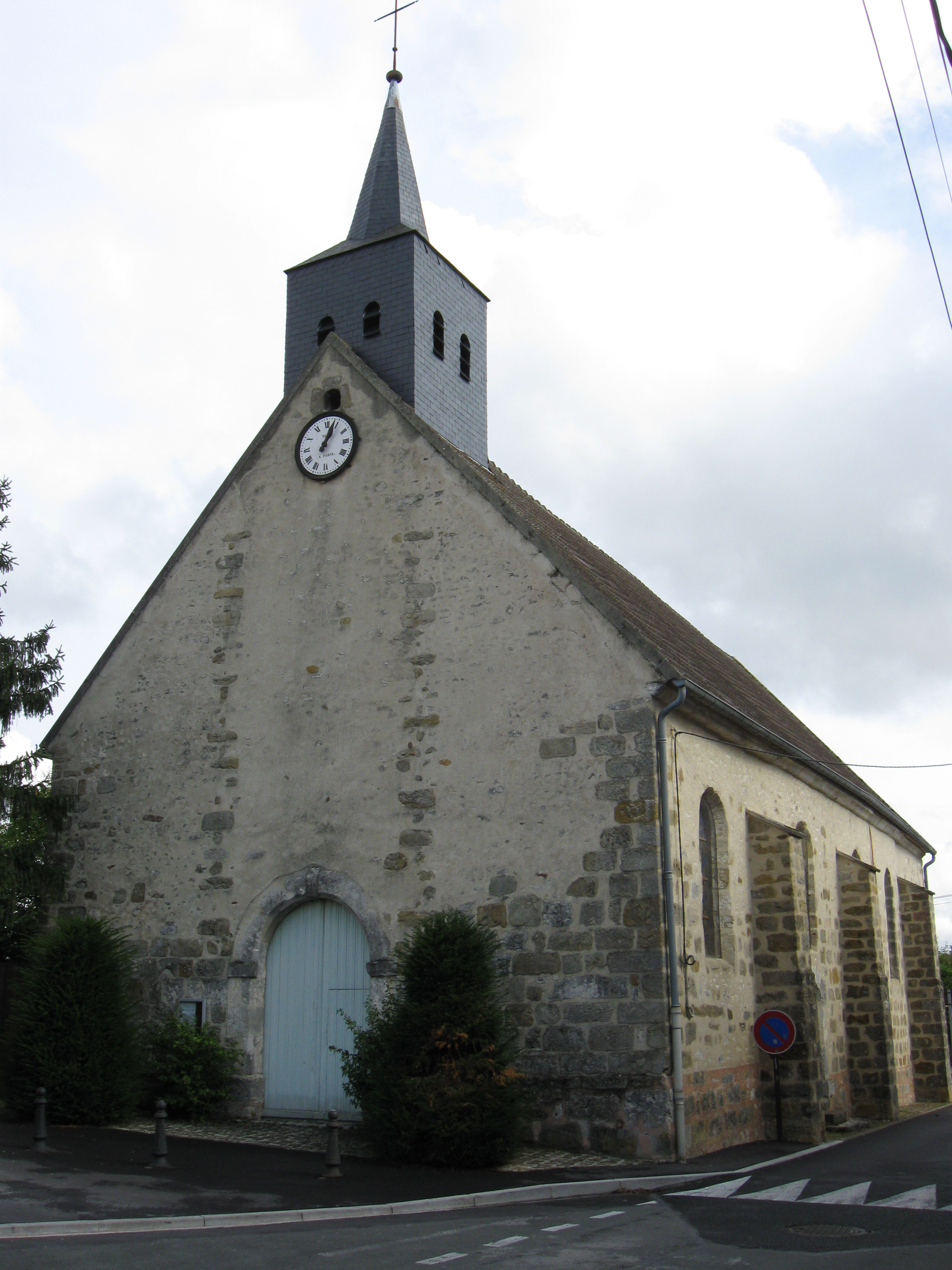 Église Saint-Michel de Sognolles-en-Montois (département de la Seine-et-Marne, région Île-de-France).